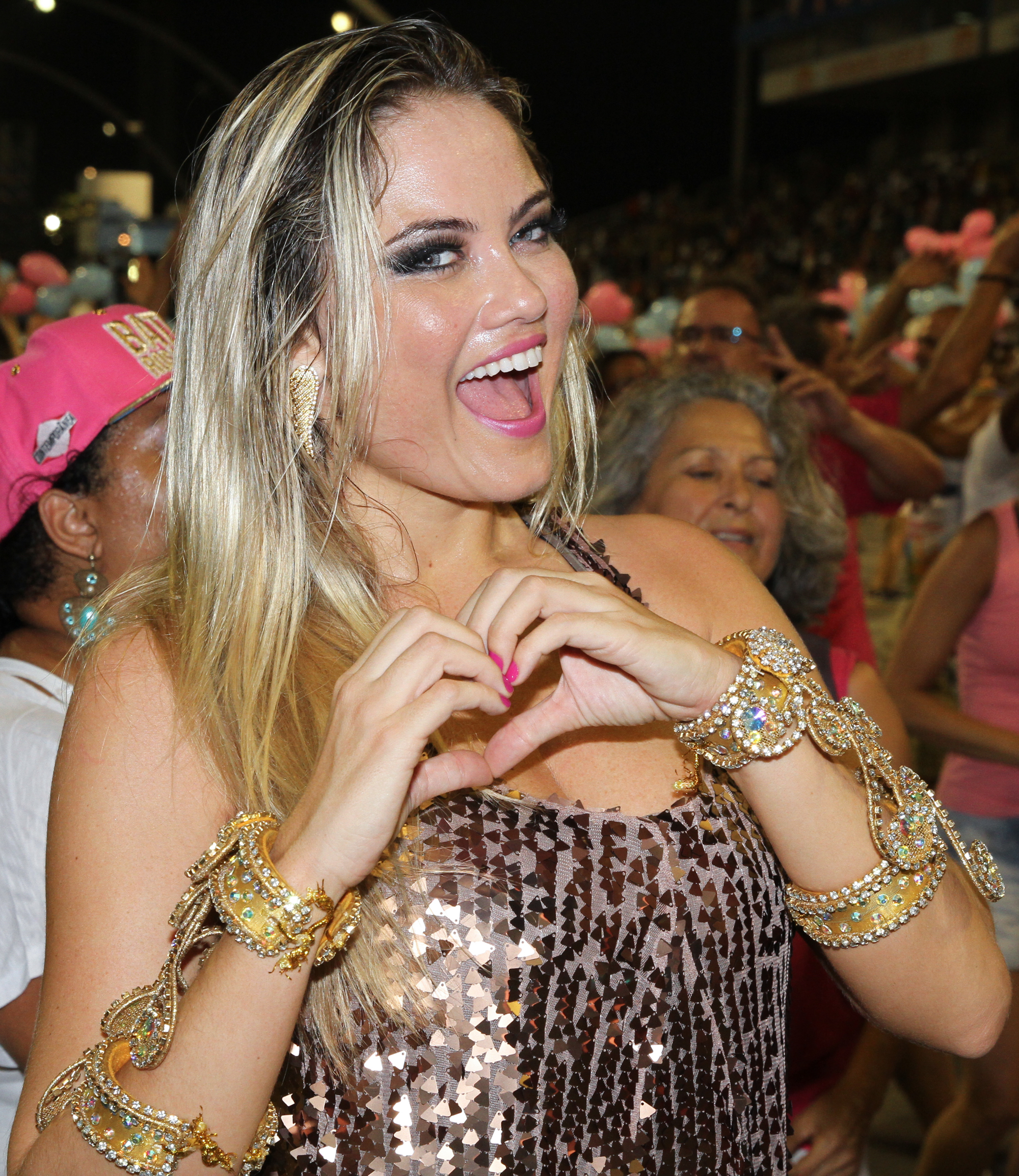 Ensaio técnico da G.R.E.S. Rosas de Ouro - 17/01/2015